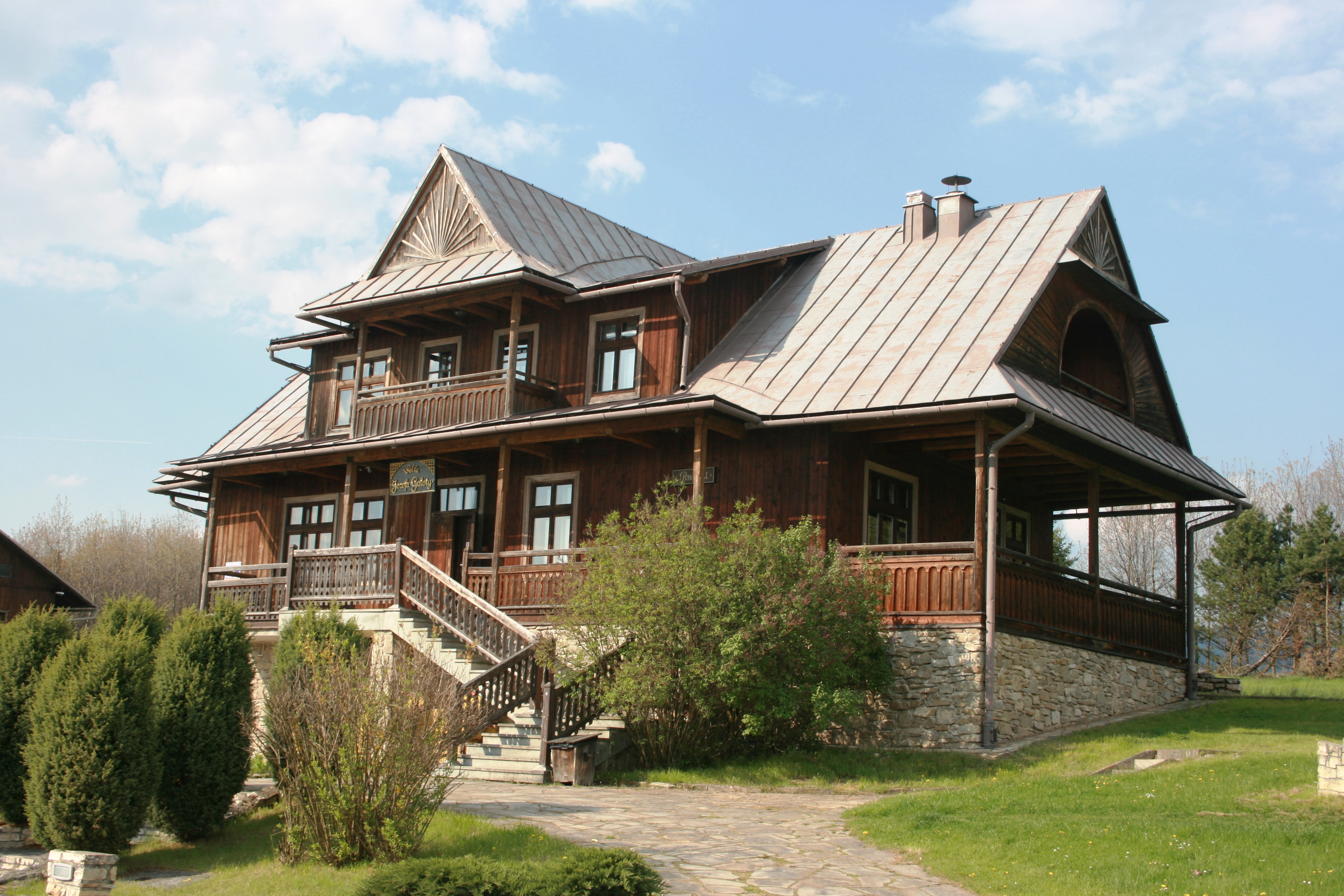 Willa Galoty w Osadzie Czorsztyn - widok od południowego wschodu